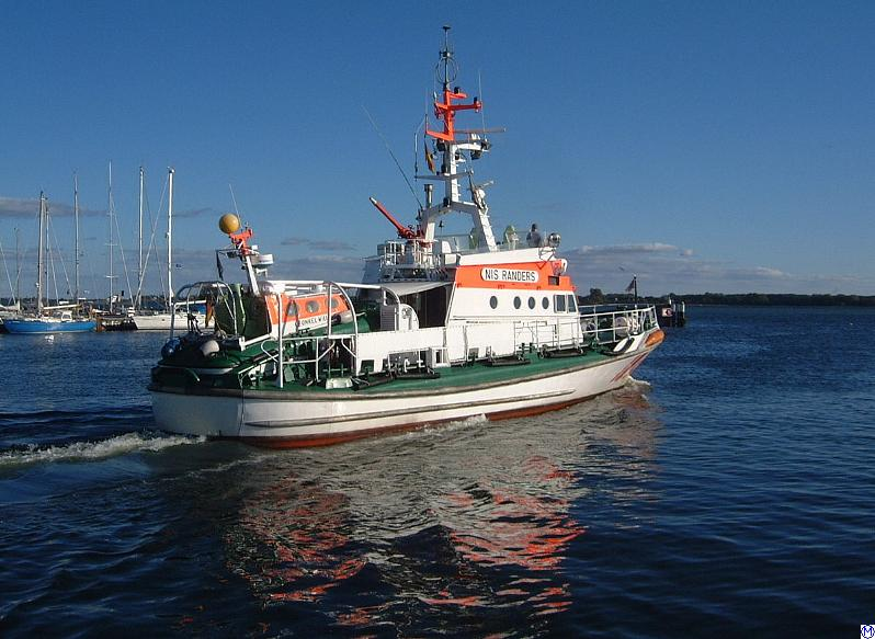 Seenotkreuzer Nis Randers (14.9.2002)